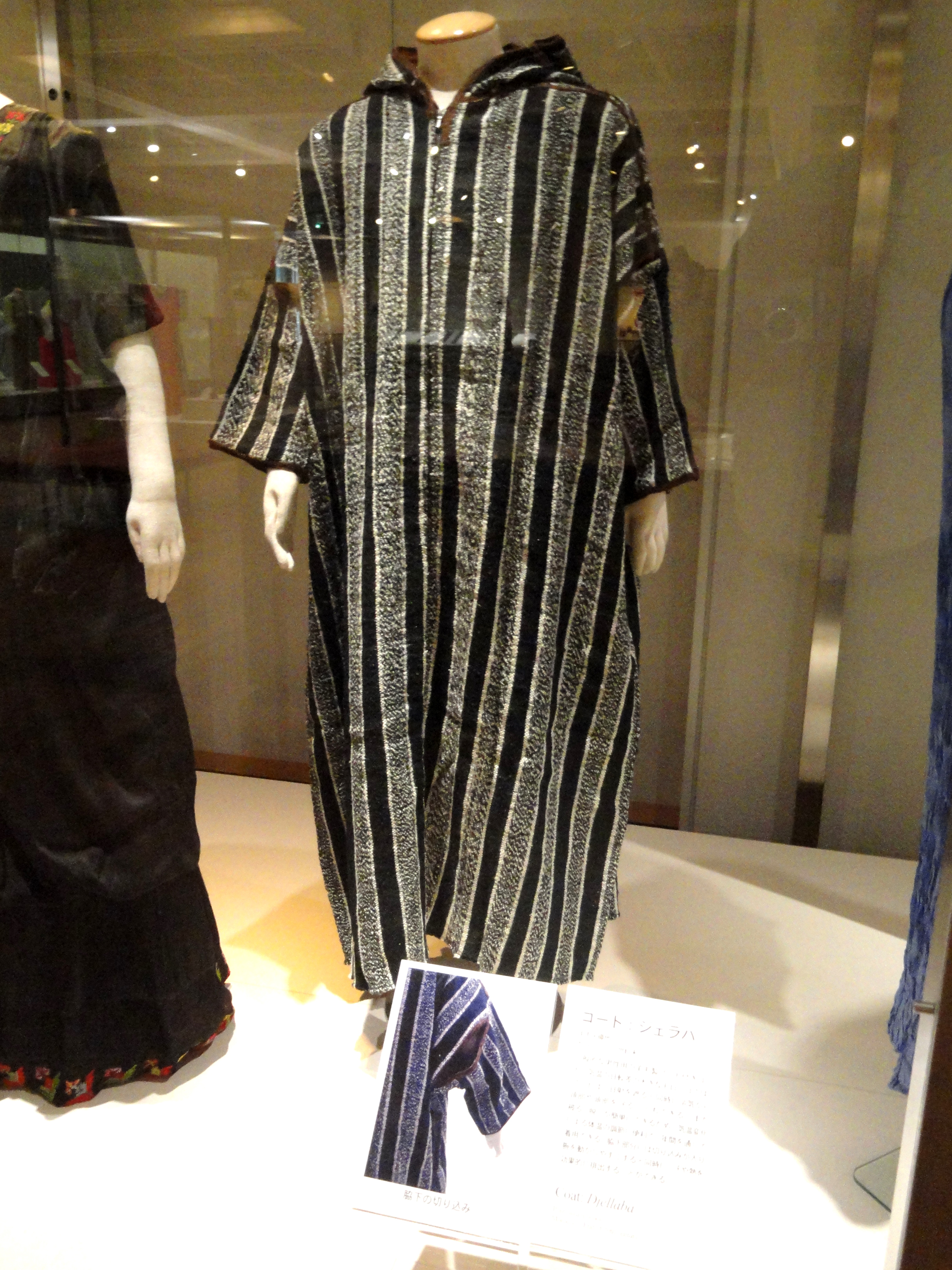 Exhibit in Bunka Gakuen Costume Museum, 3-22-7 Yoyogi, Shibuya-ku, Tokyo, Japan.